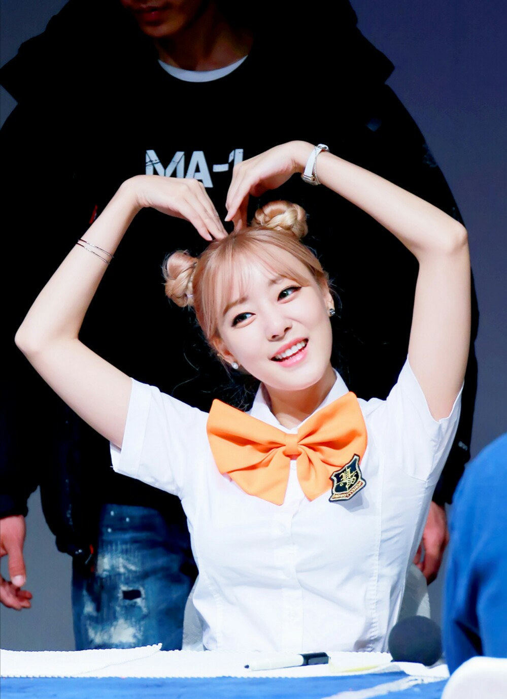 160313 레인보우 신촌 팬싸인회 우리